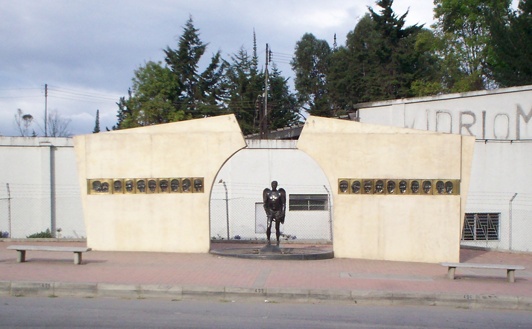 Monumento a los 21 Ángeles del 28 de abril de 2004.